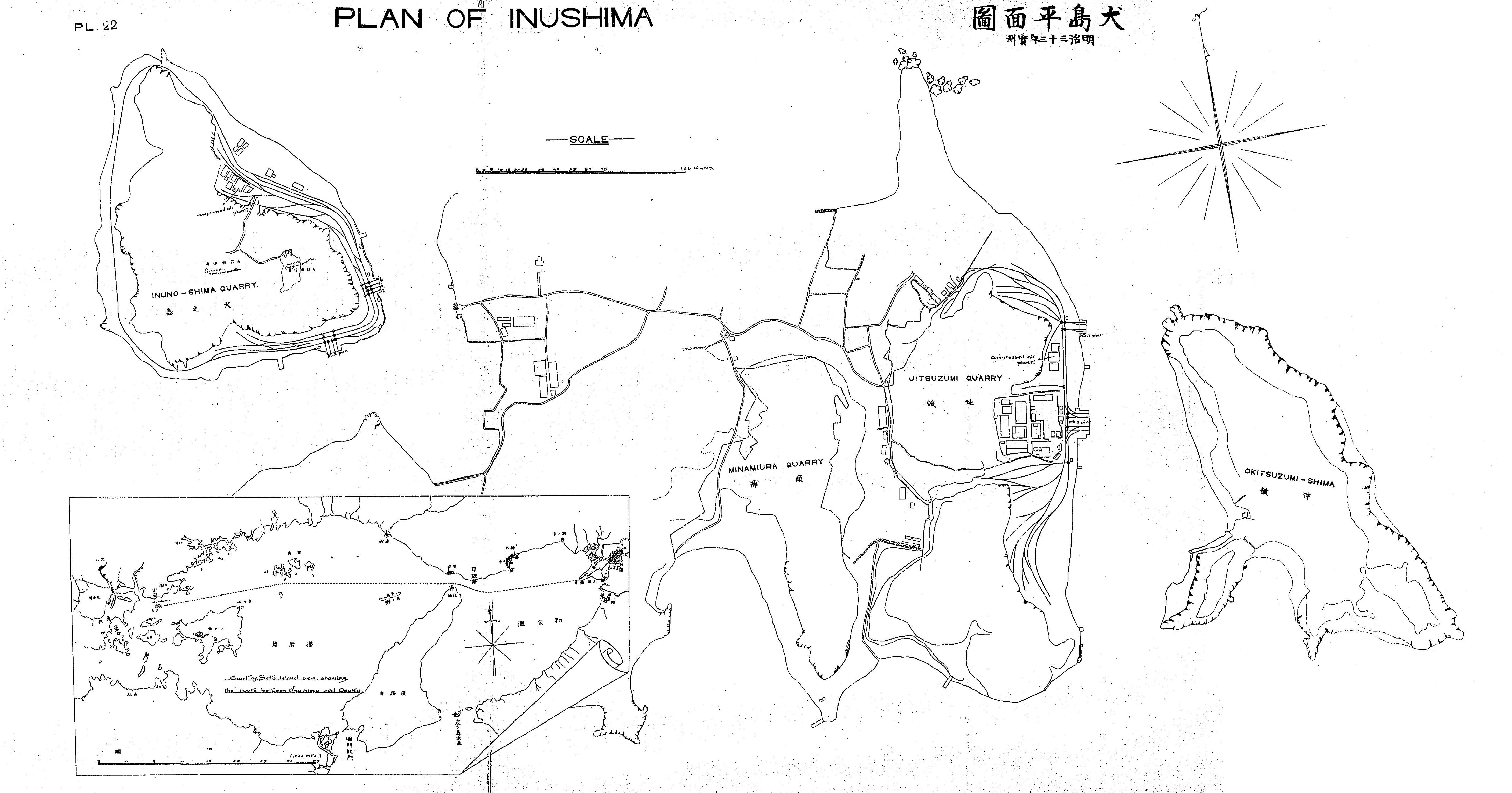 犬島諸島の地図。大阪築港誌. 図譜(